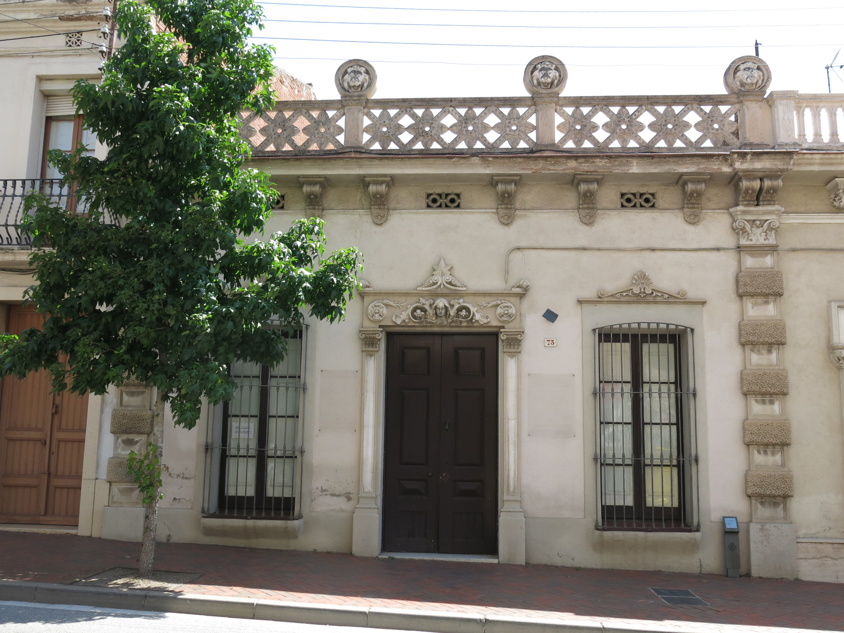 Habitatge al passeig Anselm Clavé, 73 (Sentmenat)